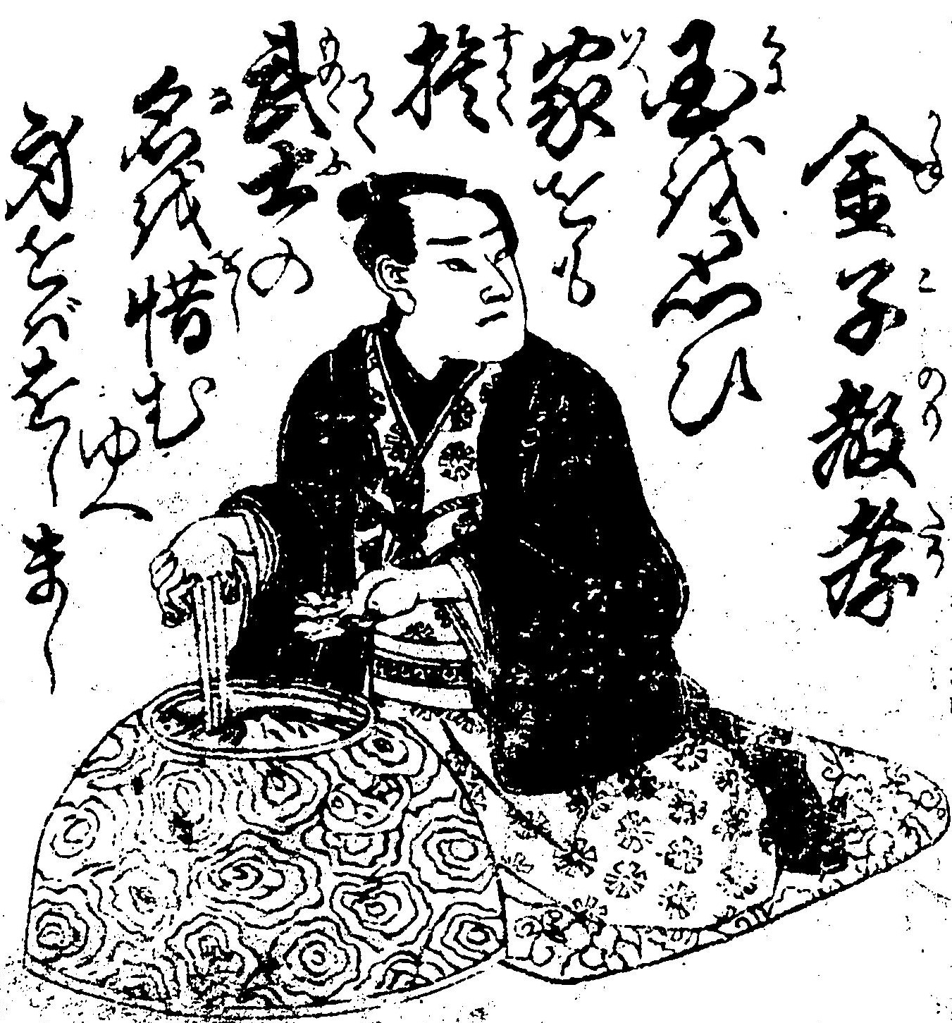 金子孫二郎教孝の肖像。